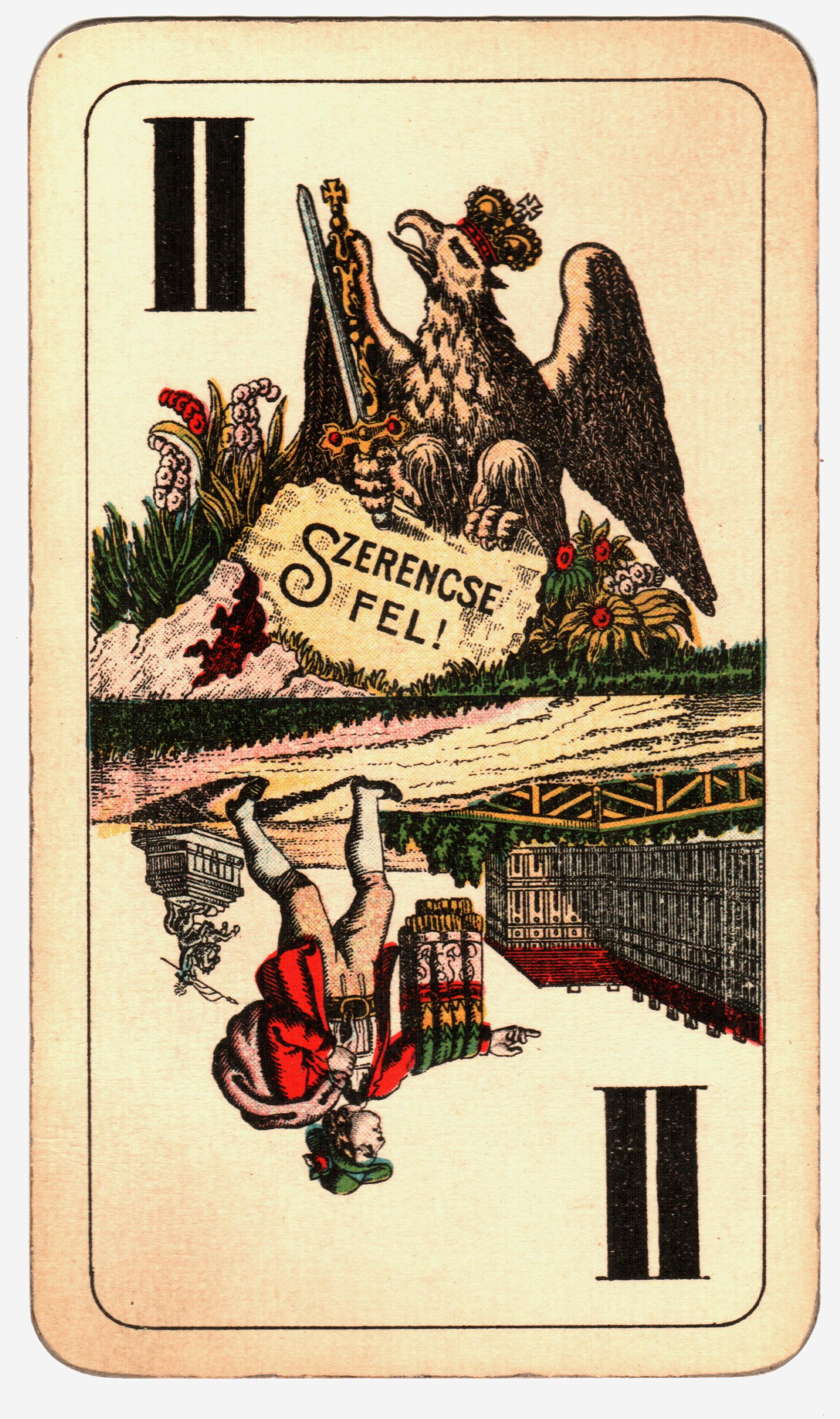 A felvételek 2013. Január 18 –án készültek. Tarokk kártya. Gyártotta Piatnik Nándor és fiai R.T. Budapest VII. Rottenbiller u. 17 szám. Mérete: 7 cm x 12,2 cm. A magyar Tell kártya története: A magyar Tell kártya az 1848 –as forradalmat megelőző időben jelent meg. Schneider József pesti kártyafestő az alsó és felső alakjait Schiller 1804 –ben írt, Tell Vilmos című drámájából vette, melyet a Magyar Királyságban, Kolozsváron már 1827 –ben előadtak. A magyar Tell kártya legrégibb ismert példányát Schneider József kb. 1835 –ben készítette. (9,4 cm x 5,6 cm). Schneider a 36 lapos kártyát rézbe metszette. A piros, skarlátvörös, kék és barna színeket sablonnal vitte a lapokra. Az arcot, a kezet és a ruházat apró díszeit kézzel festette. Az 1848 –49 –es szabadságharc leverését követően az osztrák kormányzat elkobozta a kártyákat. A Piatnik cég 1865 körül kezdte gyártani a magyar Tell kártyát. Források: Zsoldos Benő: A játékkártya és története Gondolat, Budapest 1980 ISBN 963 280 885 1